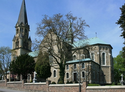 St. Severin, Eilendorf, 3 km from Aachen, Deutschland (Zone 32).